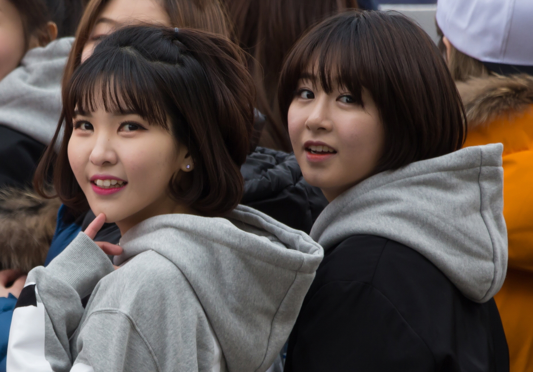 (15.03.01) 칠학년일반 출발드림팀 직찍 by 포에버